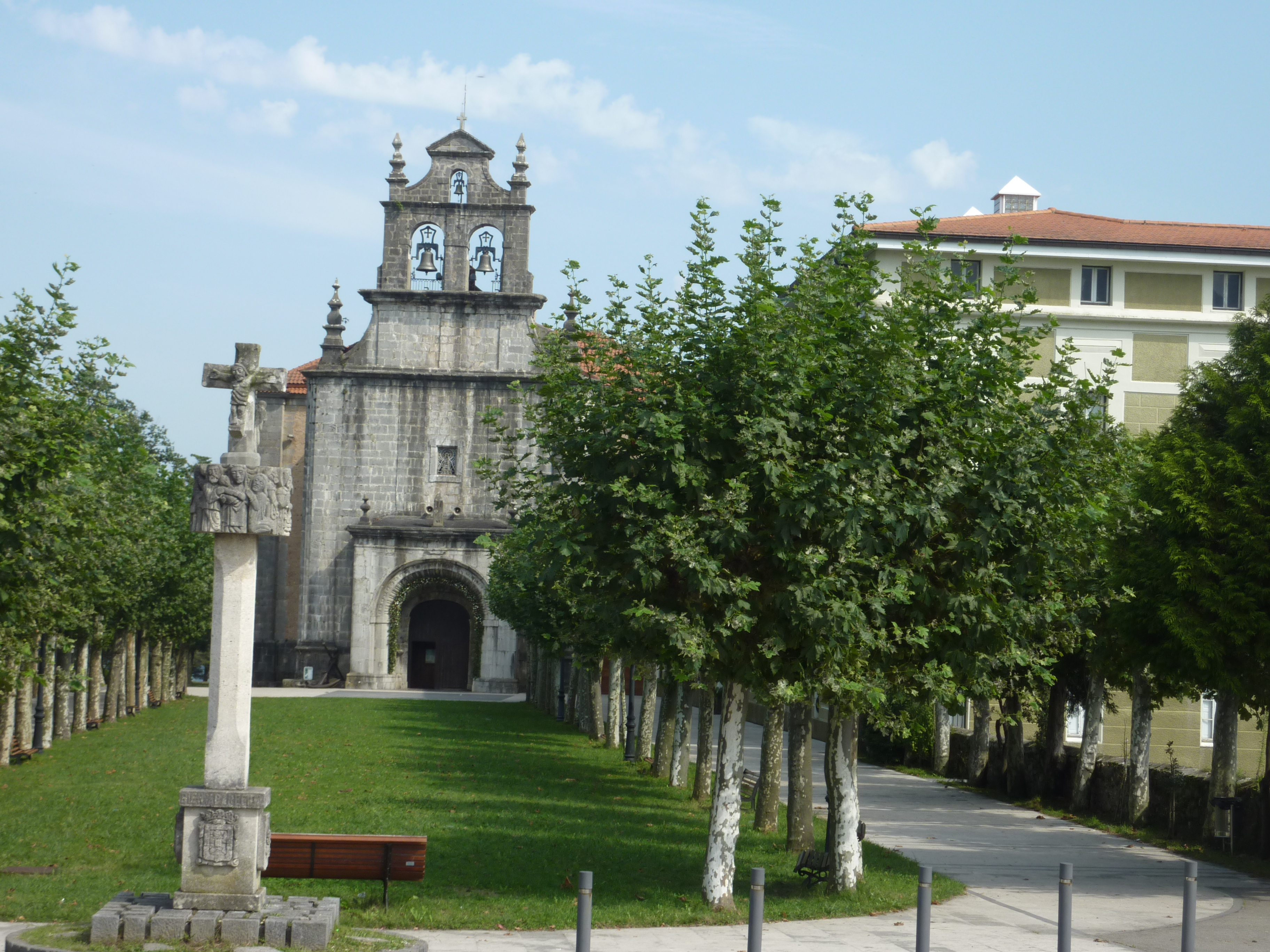 Exterior del Santuario de la Bien Aparecida (Cantabria)